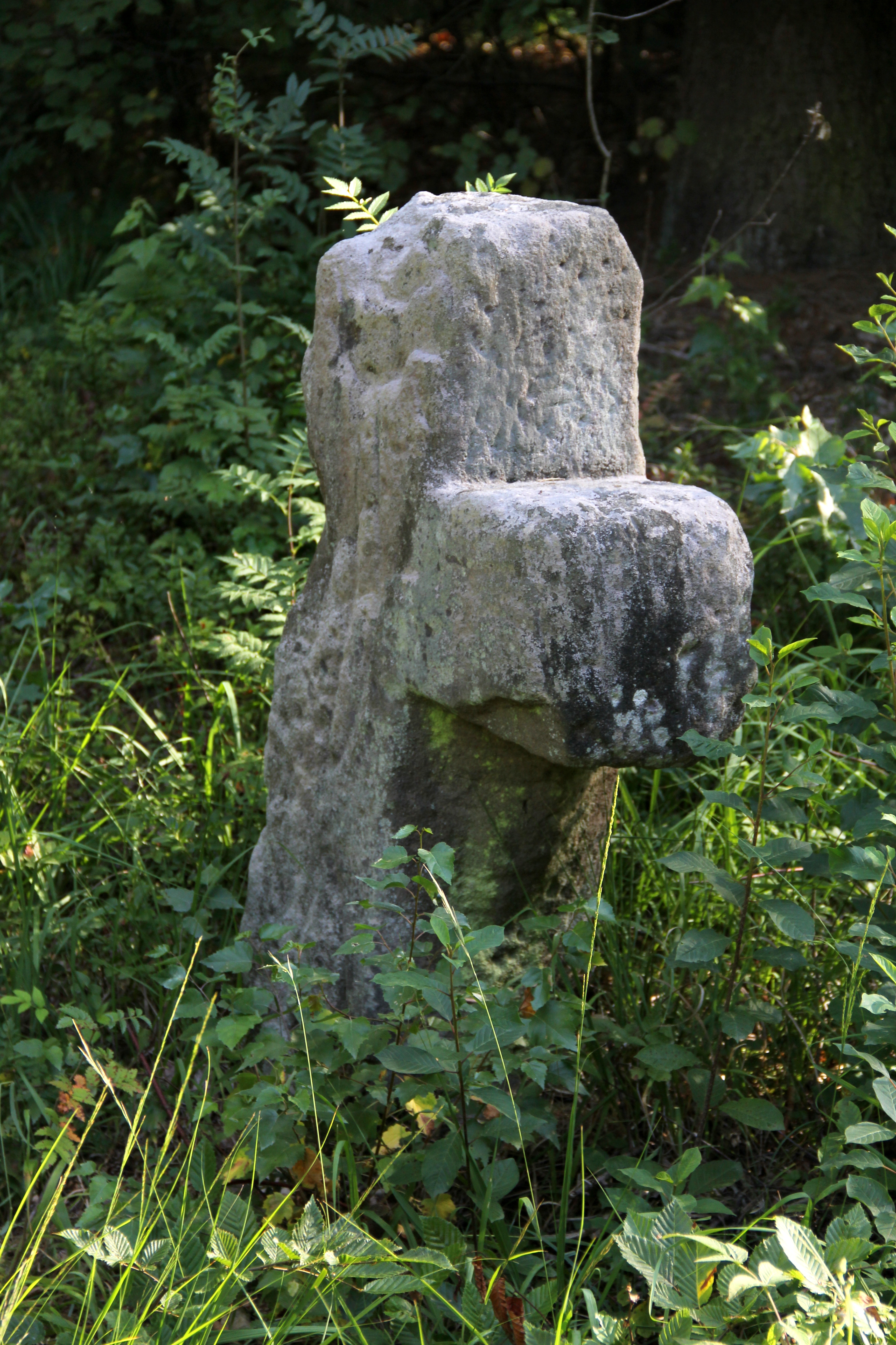 Steinkreuz